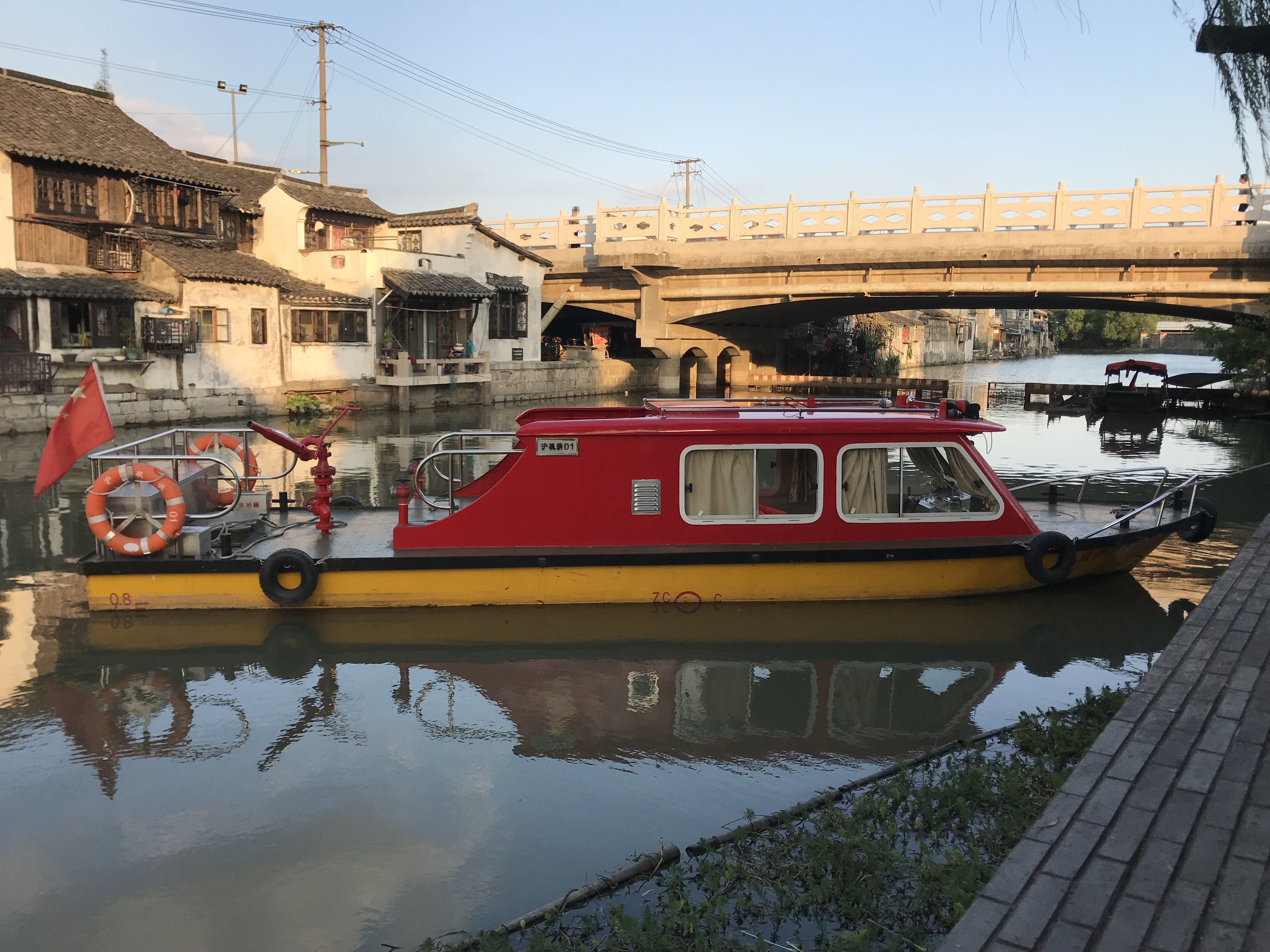 楓涇鎮の消防艇と一号橋